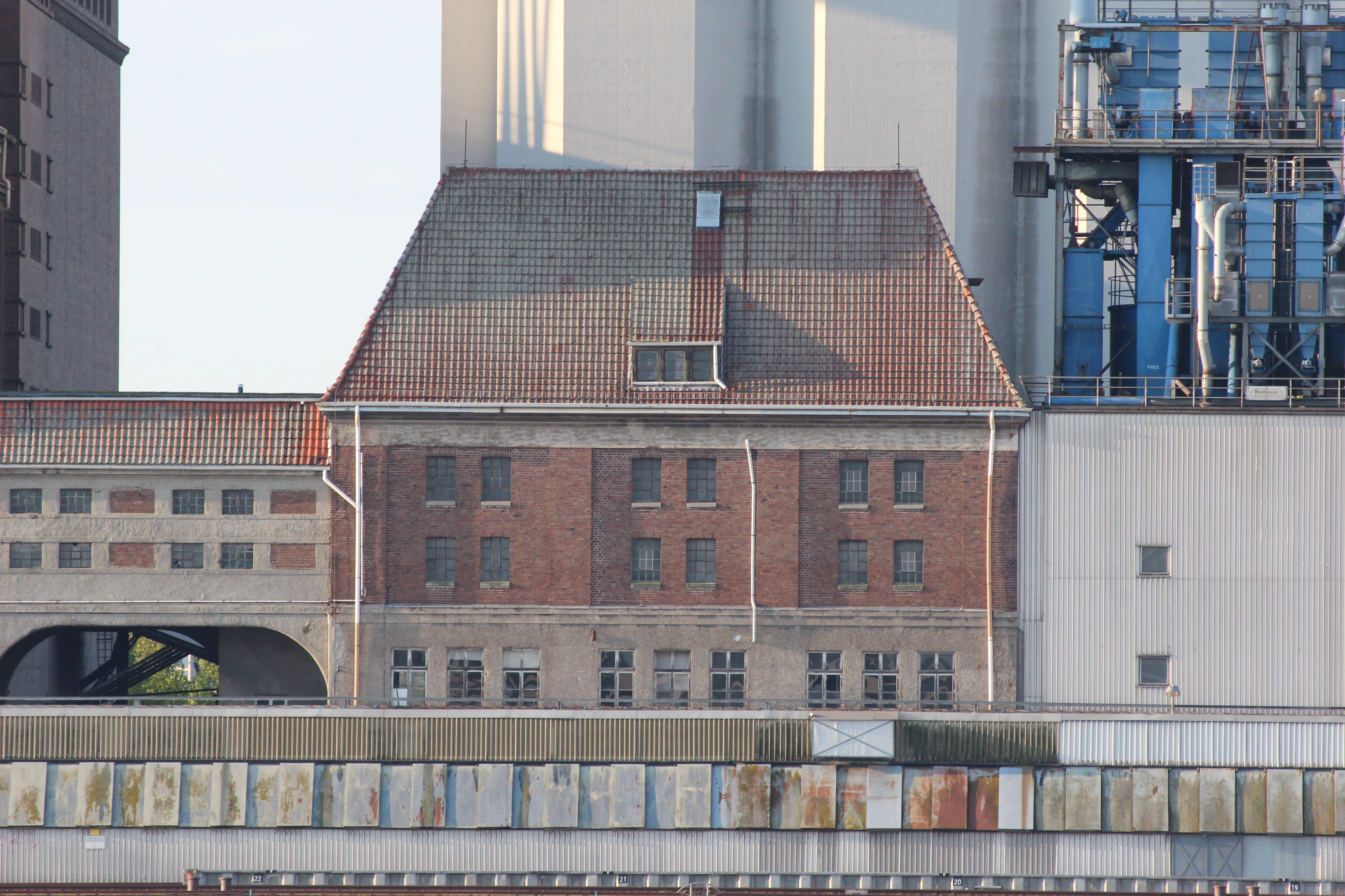 Getreideverkehrsanlage, Verwaltungsgebäude in Bremen, Getreidestraße.Das abgebildete Objekt ist ein geschütztes Kulturdenkmal in der Freien Hansestadt Bremen, mit der Nr. 1751 beim Landesamt für Denkmalpflege registriert.